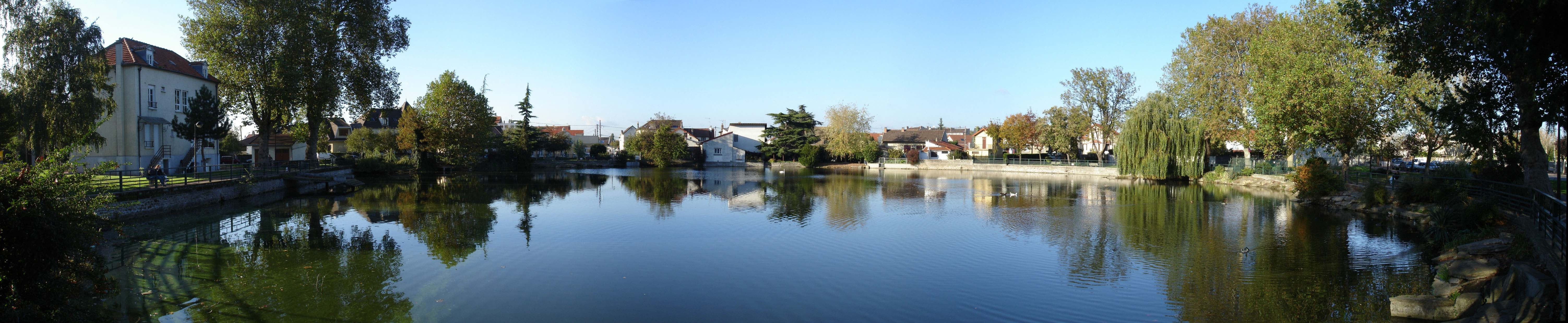 Panorama du lac Sévigné à Livry-Gargan (France).